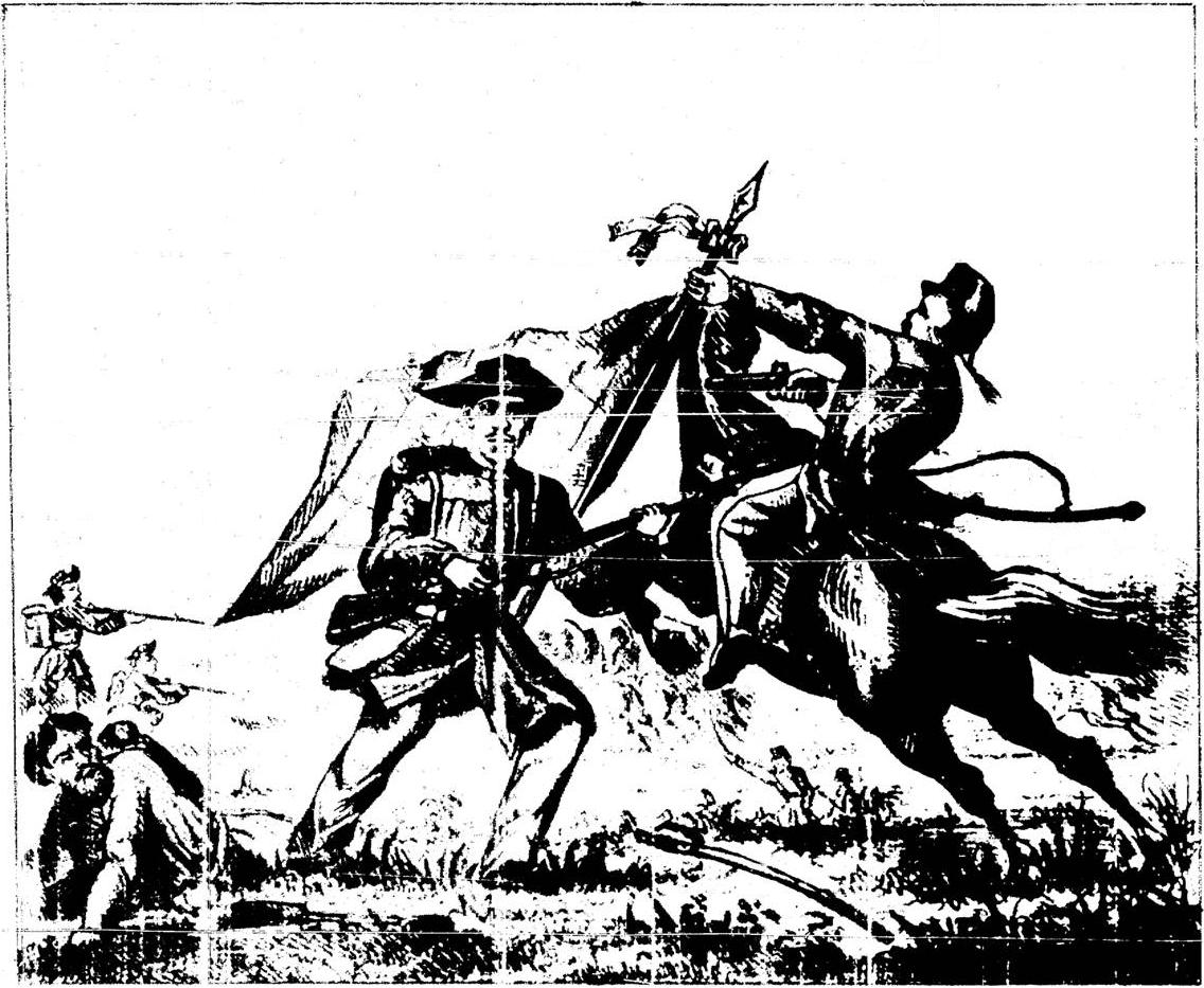 Luiz Antonio de Vargas salvando a bandeira de seu batalhão no combate de S. Borja em 10 de janeiro de 1865.